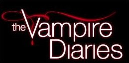 Logo de la série télévisée Vampire Diaries